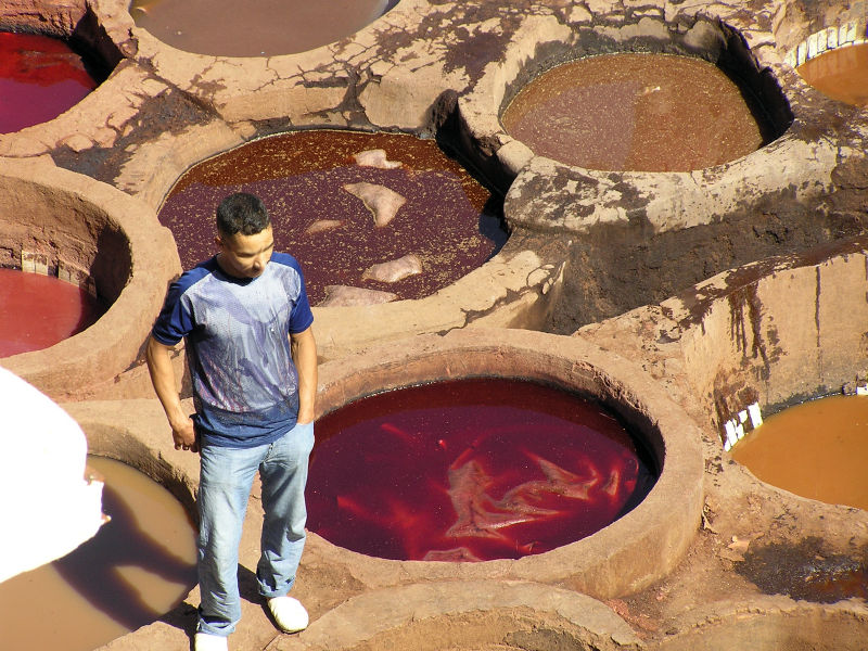 Barevna v Maroku